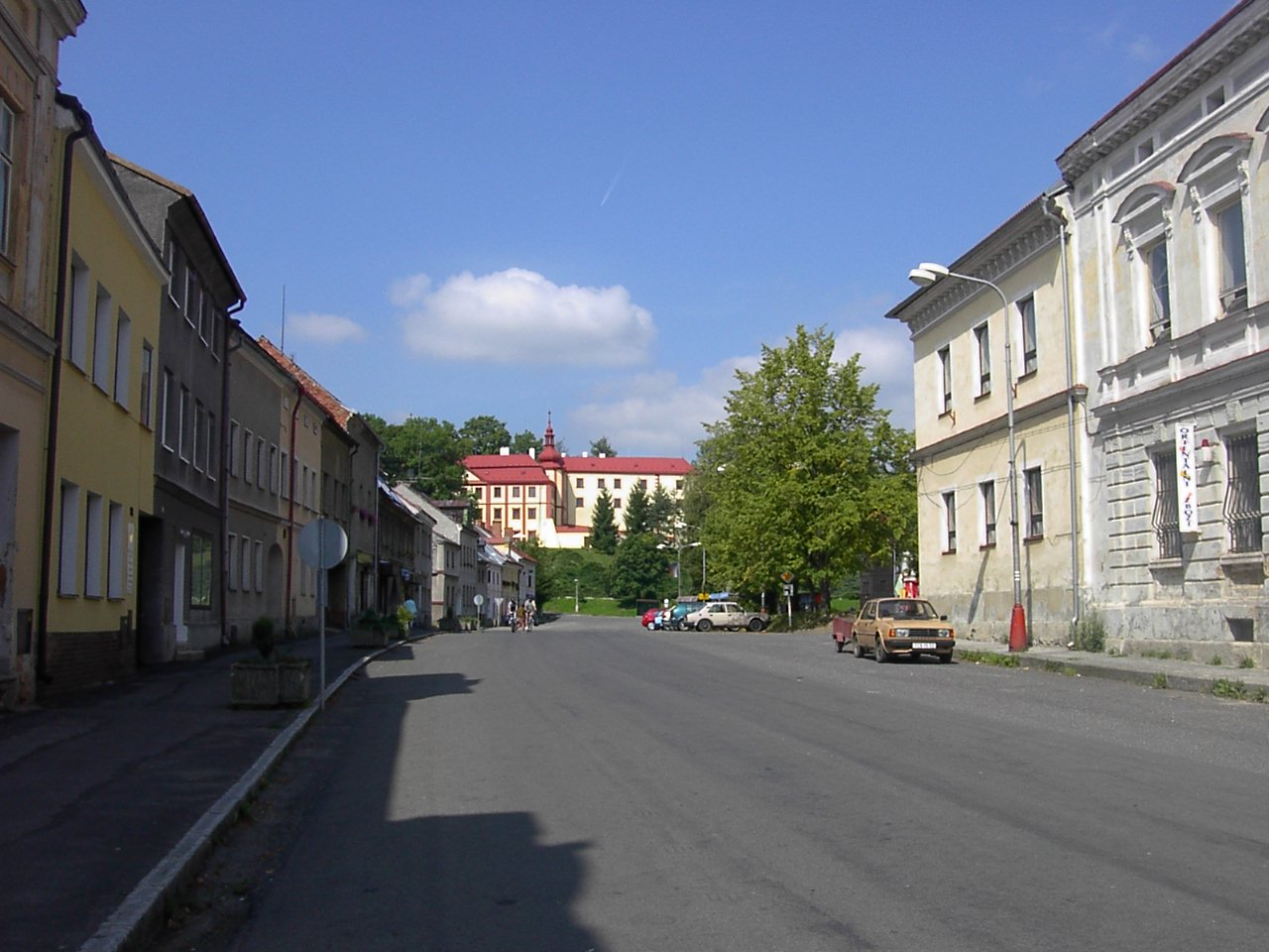 Square and castle in Bezdruzice, Czech Republic. náměstí a zámek v Bezdružicích na okrese Tachov